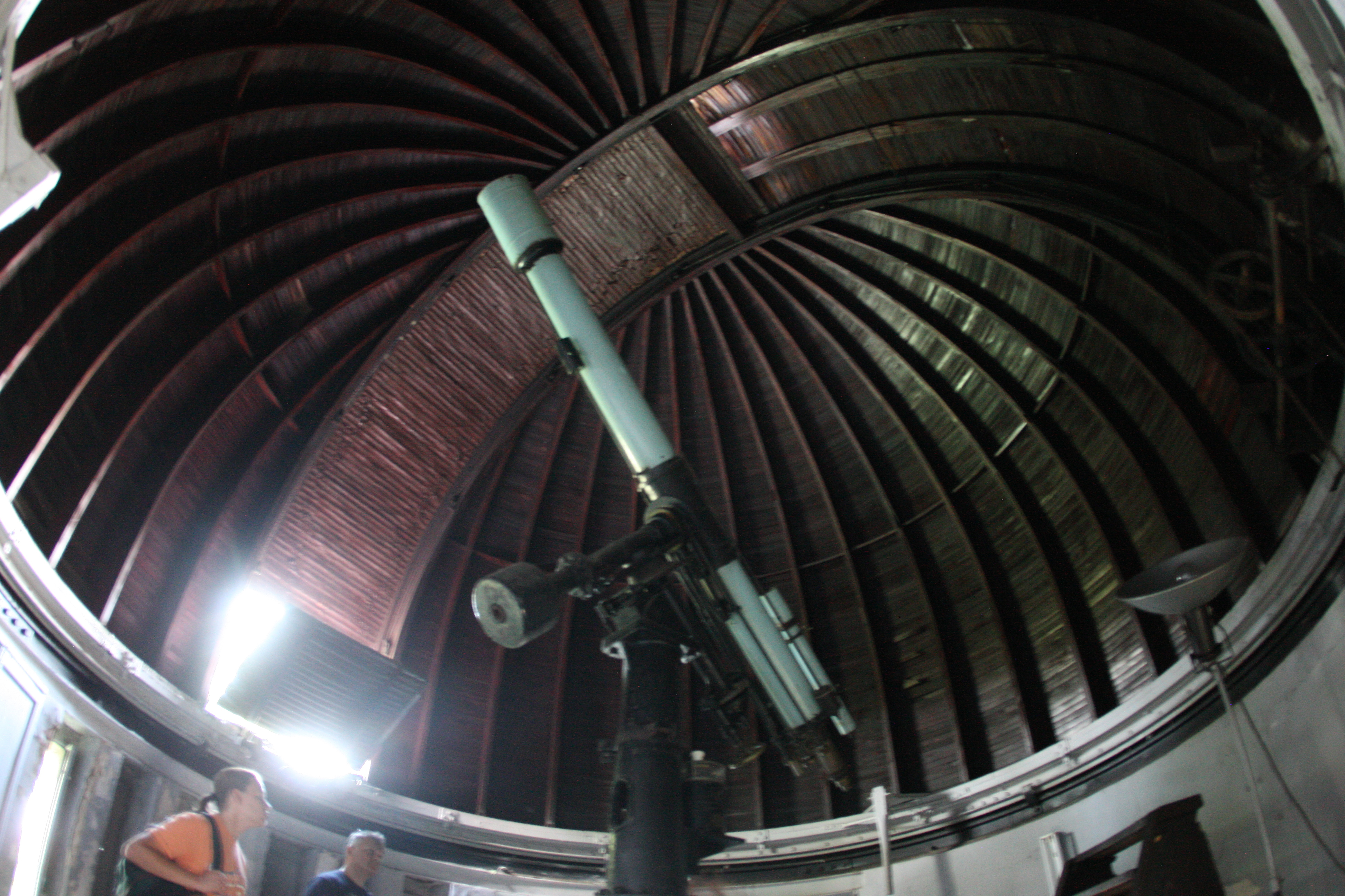 Observatorul astronomic si casa memoriala amiral Vasile Urseanu. Cupola cu vechiul telescop.